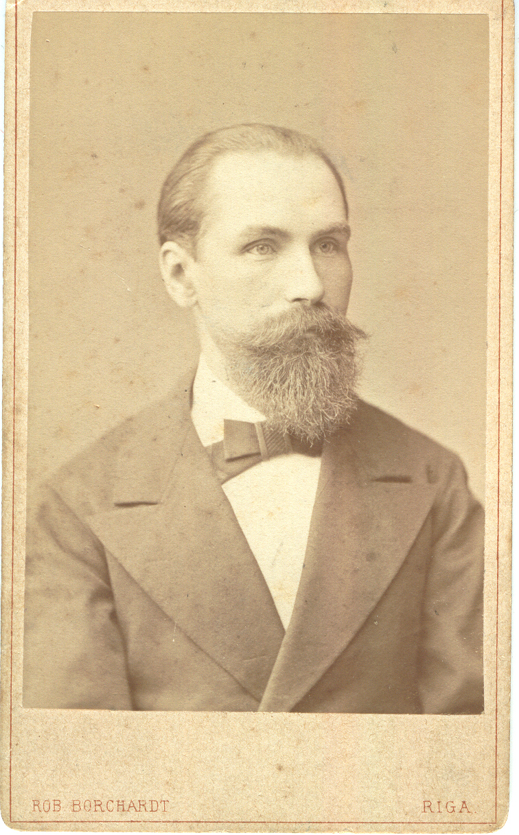 MuuseumikoguFotokoguOlemusfotoOriginaaloriginaalSäilivusrahuldavEritingimusedeksponeeritav tavatingimustesEraldatavad osadTehnika must-valge foto (foto ) Materjal fotopaber (foto ); papp (alus) Värvus pruun (foto ) Mõõdud kõrgus: 8.6 cm (kujutis ); kõrgus: 10.6 cm (papist alus); kõrgus: 6.0 cm (kontranegatiiv ); laius: 5.6 cm (kujutis ); laius: 6.3 cm; laius: 9.0 cm (kontranegatiiv ) füüsiline kirjeldus Rinnaportree, 1/4 pöördes paremale. Tumedad juuksed, hõredad tumedad kulmud. Hallisegune lõuahabe, pikad vuntsid. Nägu pikergune, laup kõrge. Seljas hele dam pintsak, valge triiksärk, ees ühevärviline ristlips. Foto kleebitud papist alusele signatuur/ meistrimärk Rob. Borchardt/Riga . Asukoht objektil: foto all alusel ja sama pöördel